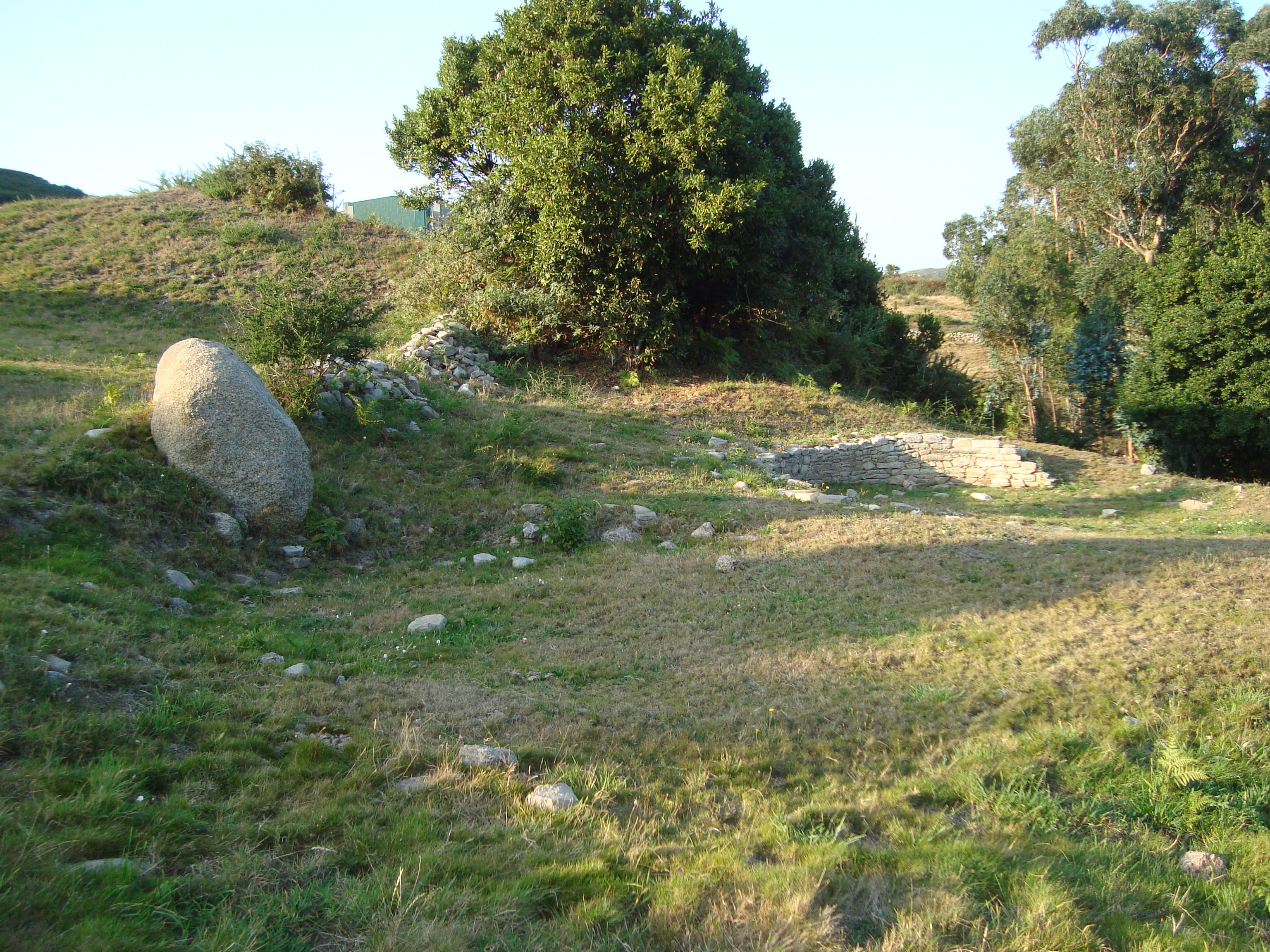 Castro de Nostián, Visma, A Coruña